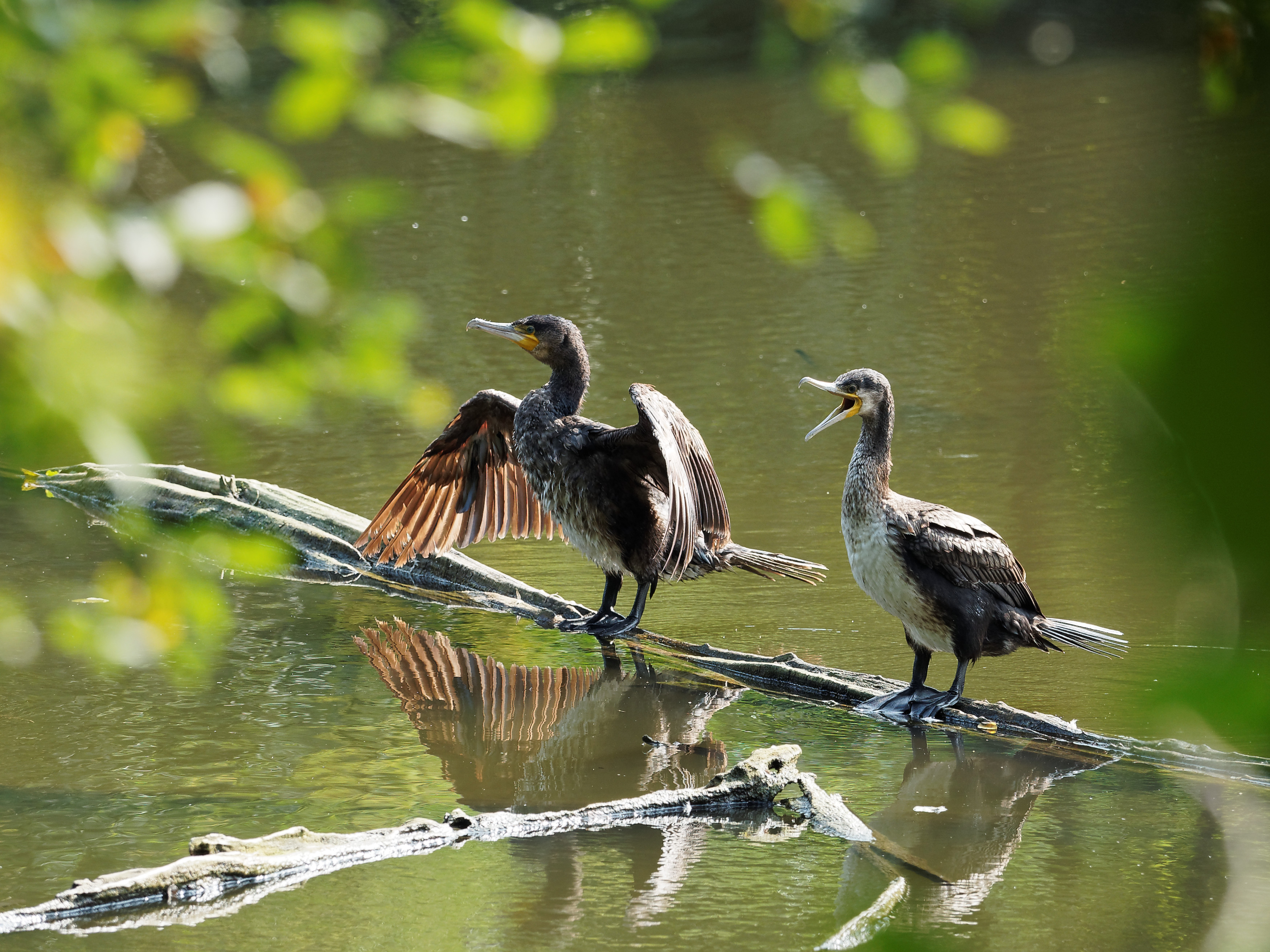 Kormorane beim Trocknen des Gefieders im Landschaftsschutzgebiet Grünzug östlich Friedrich der Große-Storchenwiese in Herne-Sodingen, LSG-4409-0030. CDDA-Code:555561071